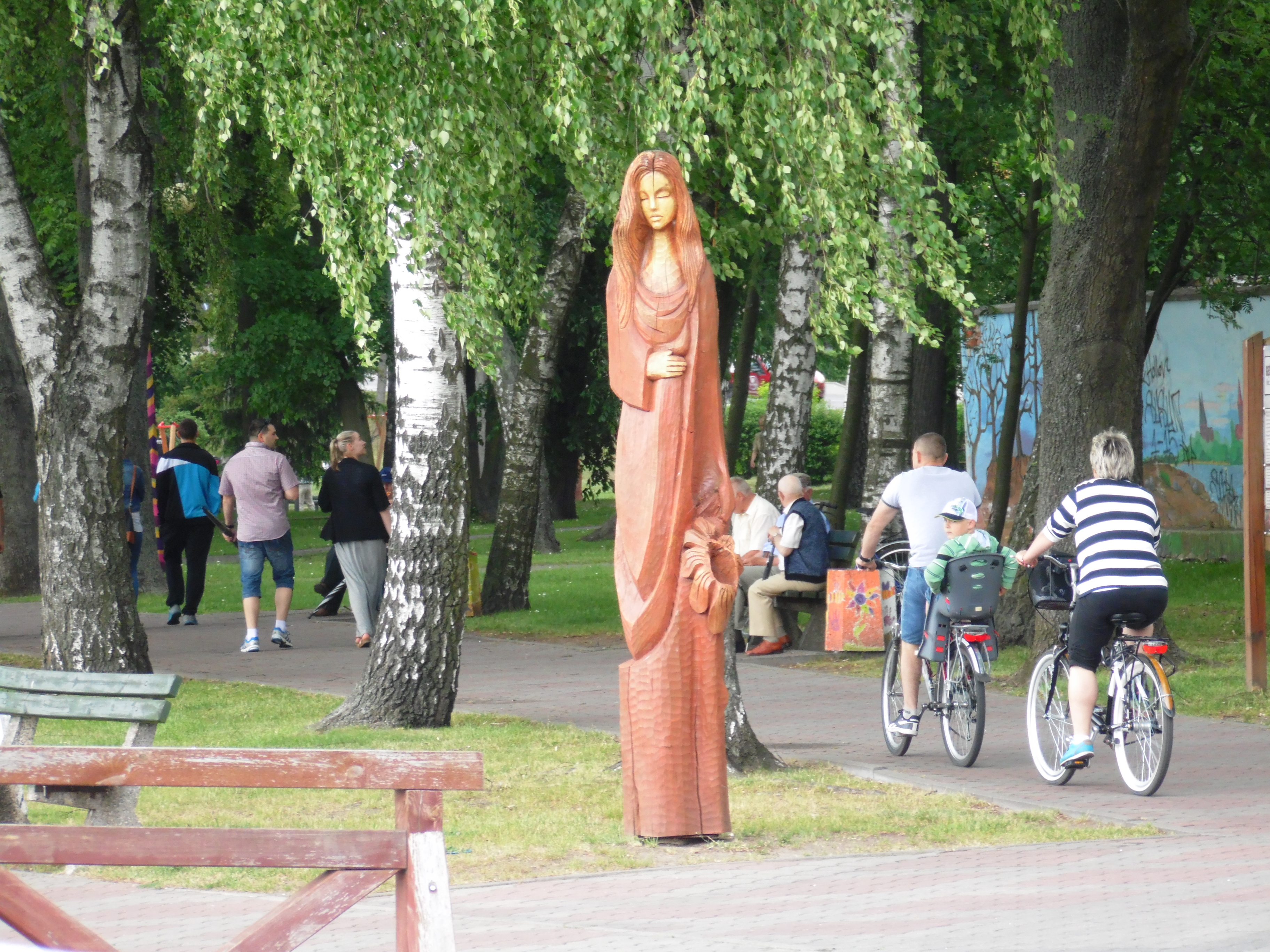 DREWNIANA RZEŹBA.